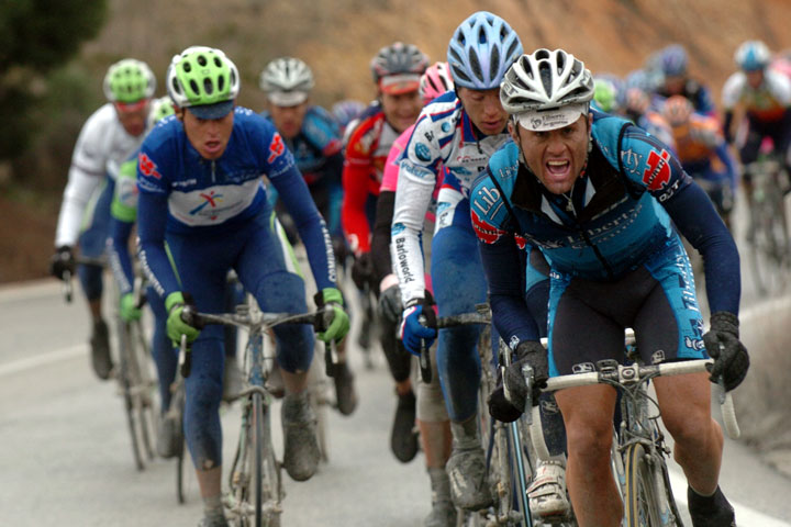 Afbeelding van David Etxebarria.